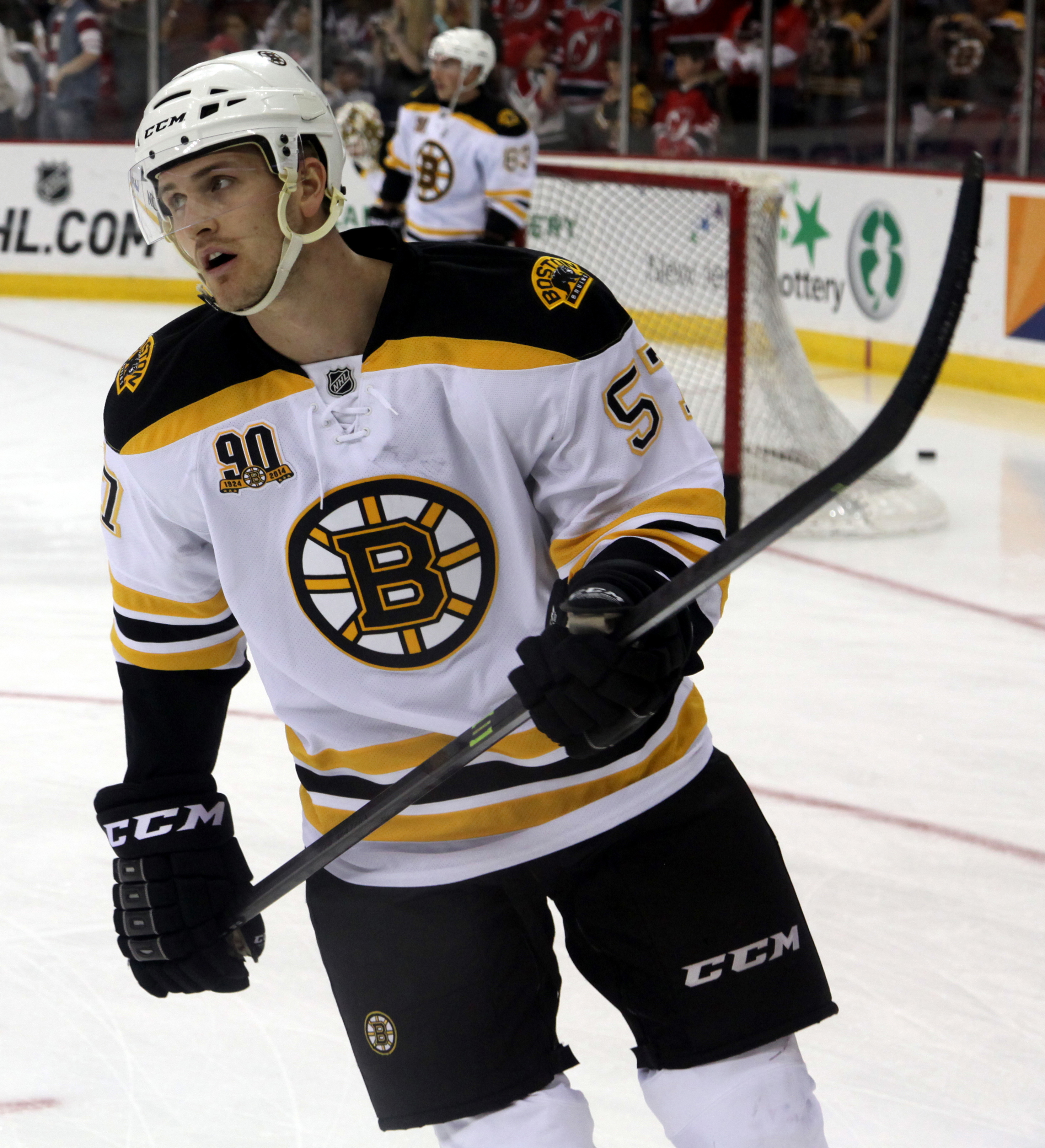 Justin Florek in 2014.